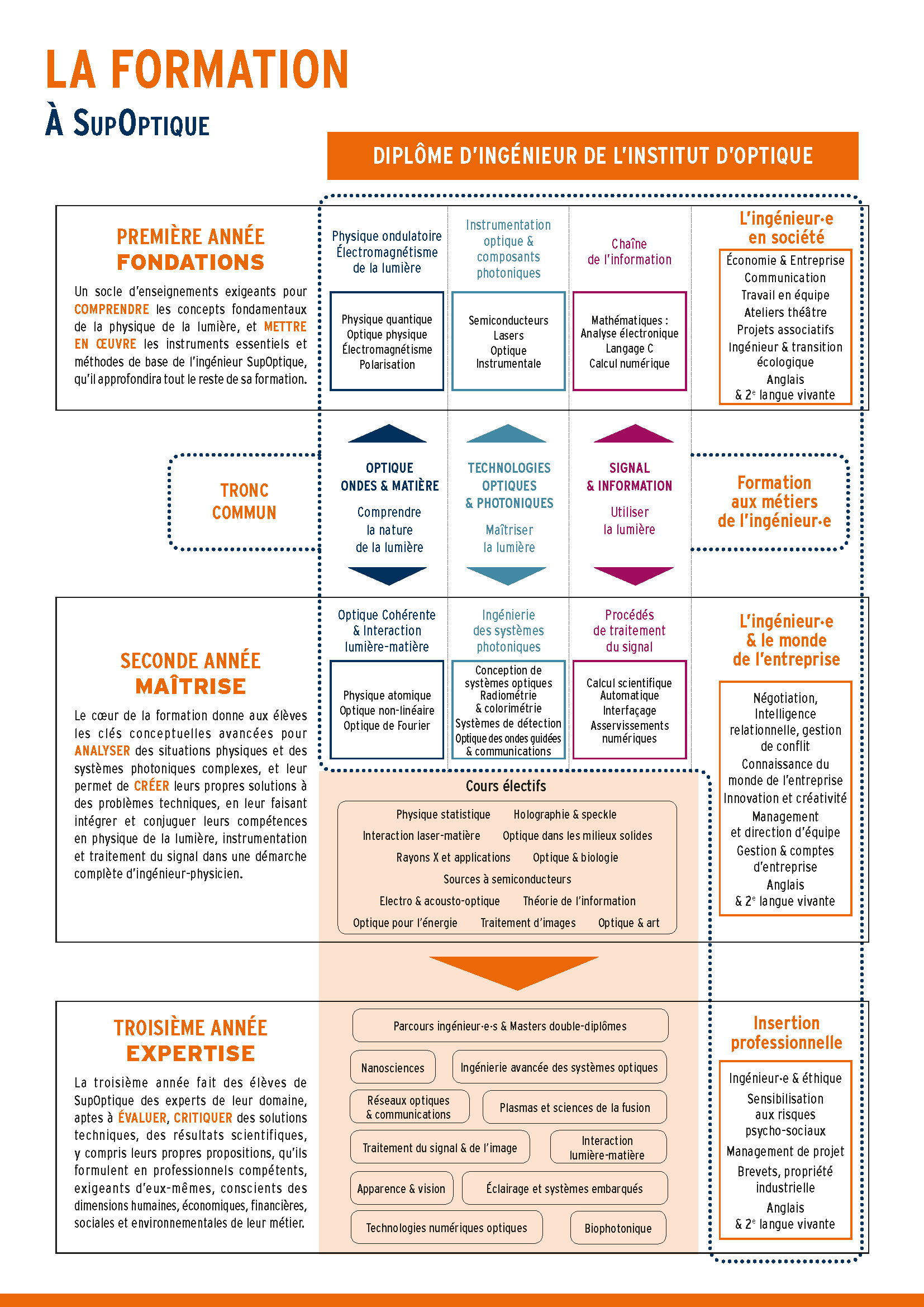 Programme de formation du cycle ingénieur